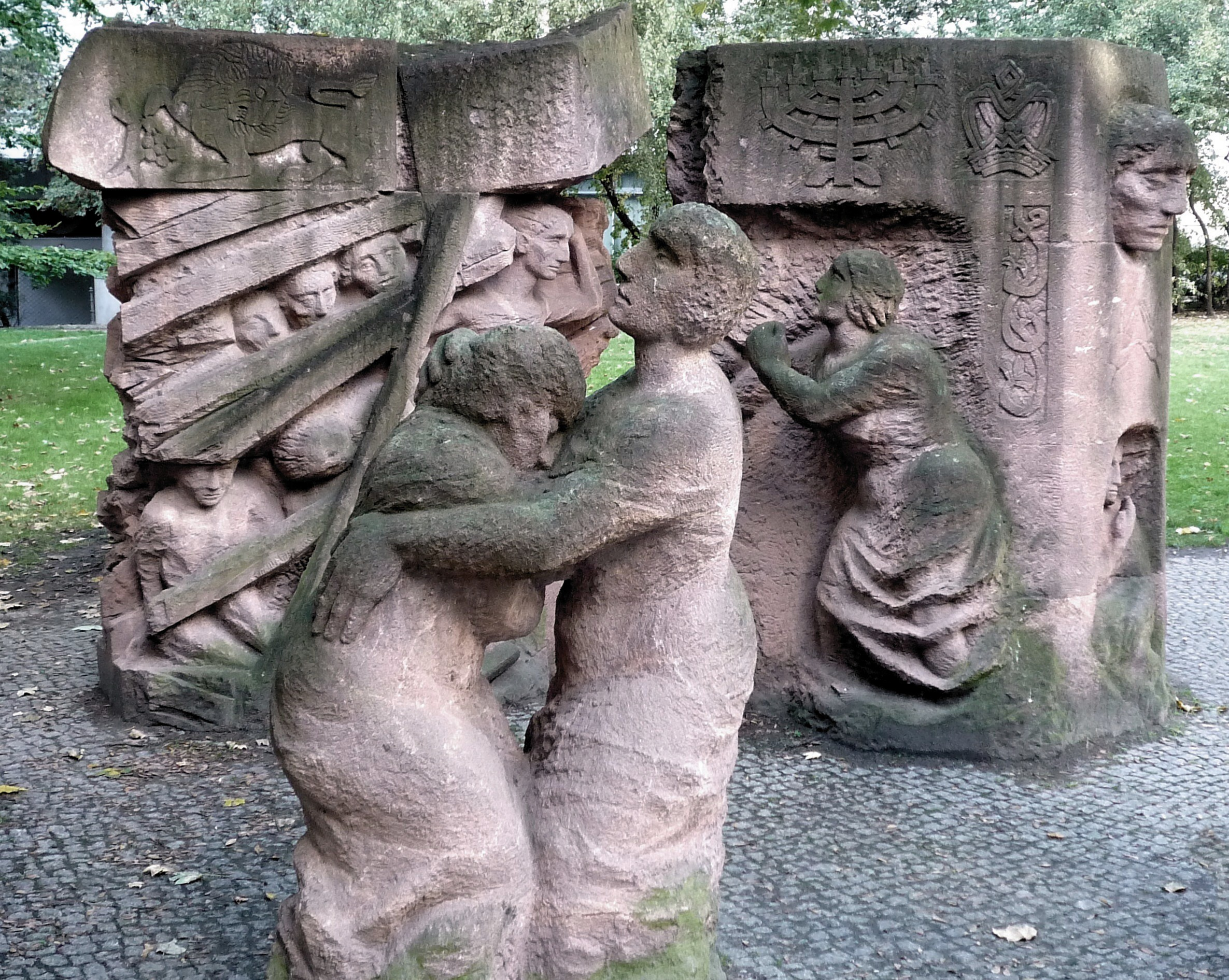 Skulptur "Block der Frauen" von Ingeborg Hunzinger in in der Rosenstraße in Berlin-Mitte, Teilansicht. Das mehrteilige Denkmal erinnert an den Protest Berliner Frauen gegen die Verhaftung ihrer jüdischen Angehörigen 1943.